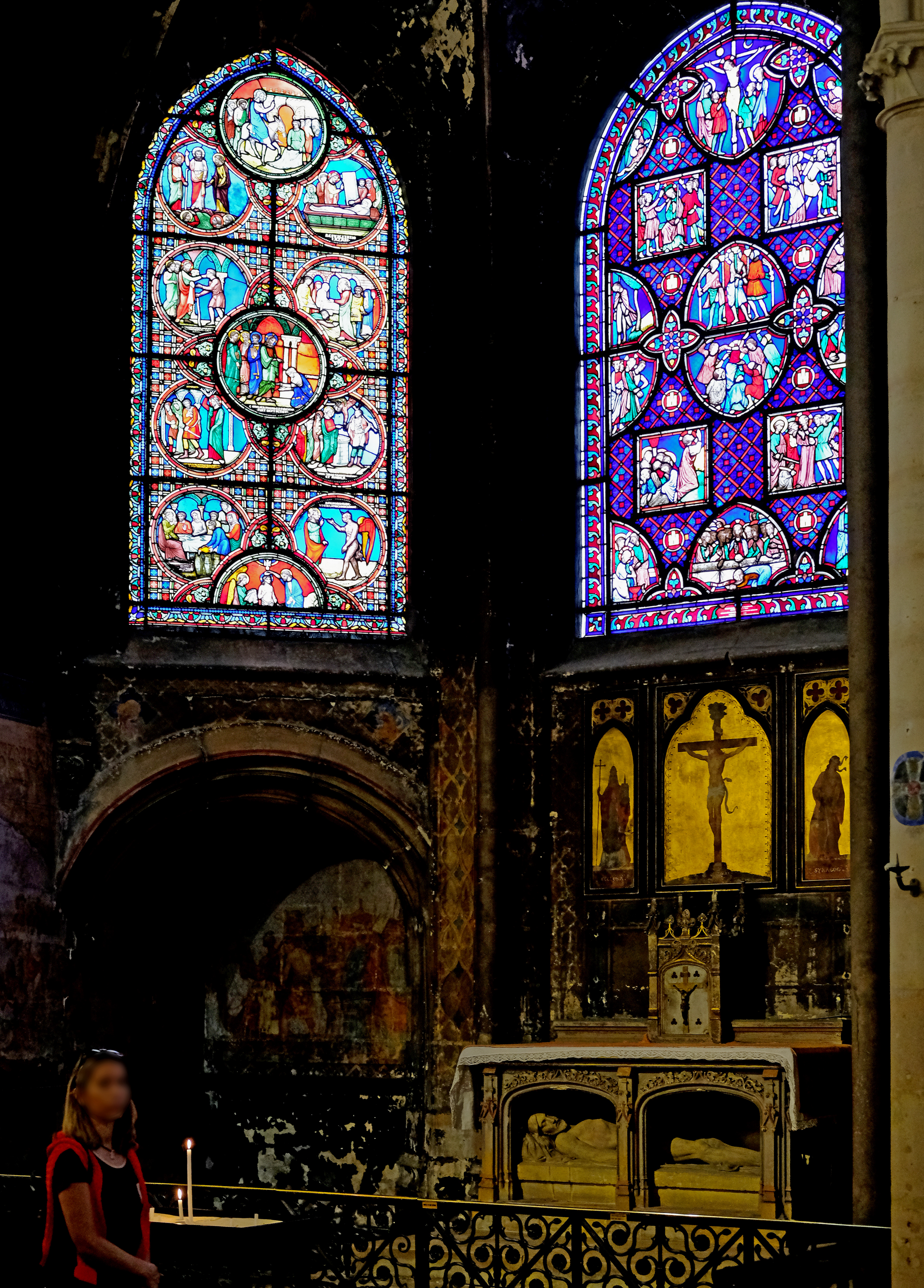 Église Saint-Germain-l'Auxerrois (chapelle du Tombeau ou du Calvaire) - Paris Ier